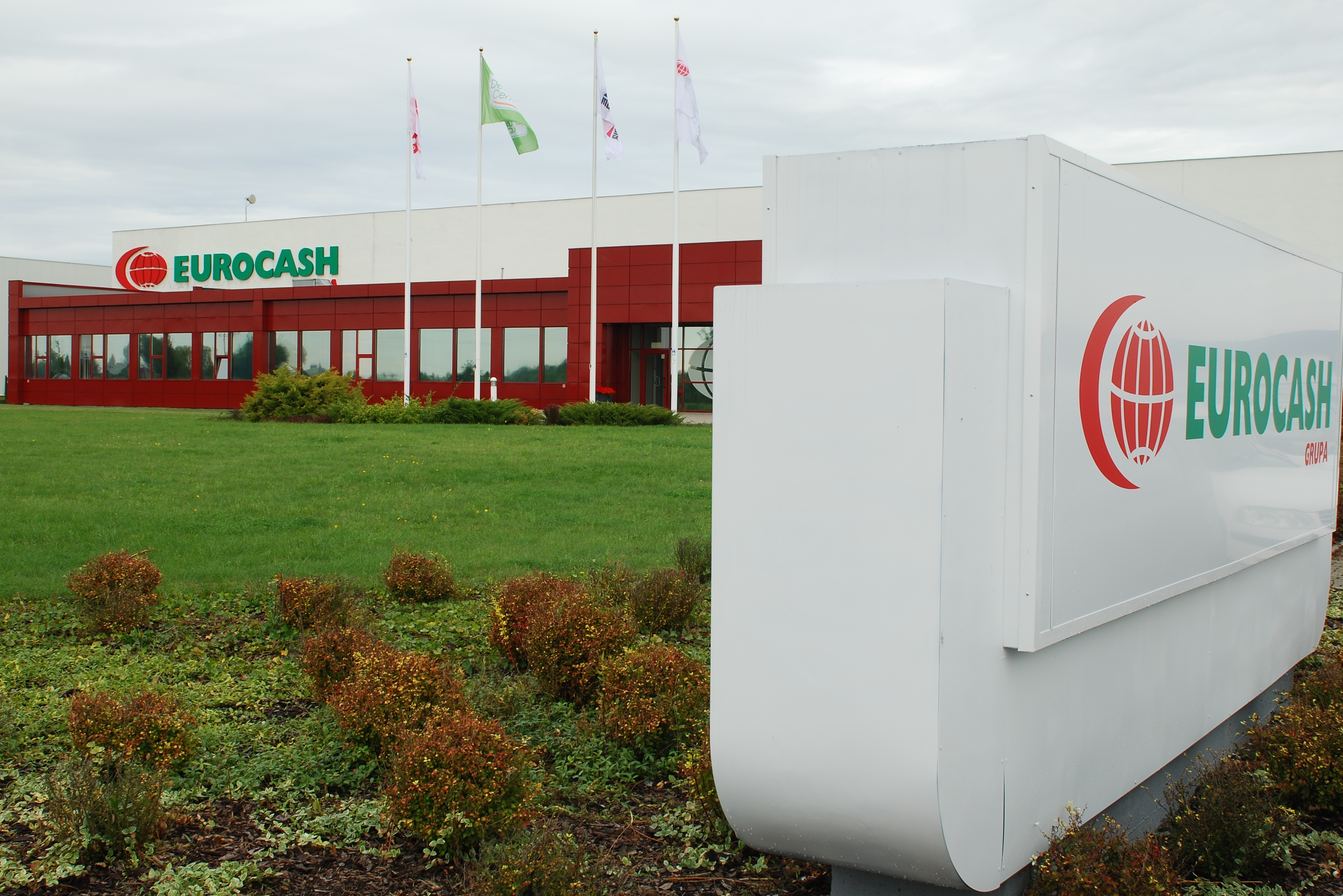 Eurocash Błonie